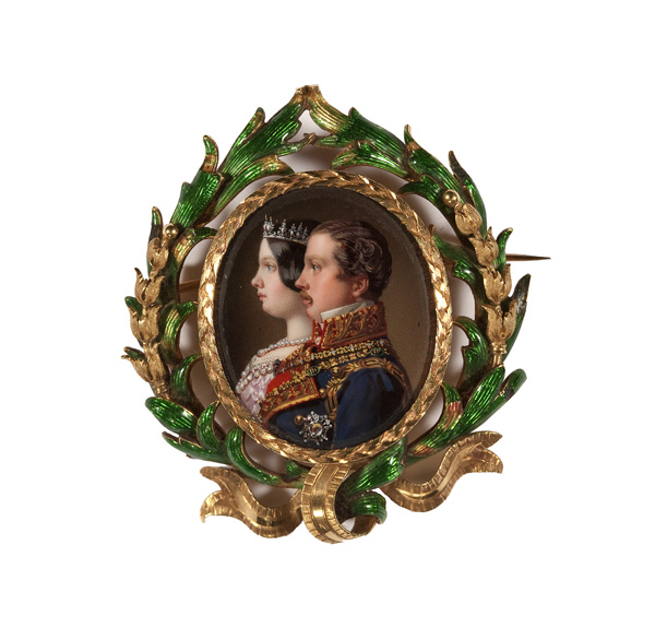 Miniatura. Isabel II y Francisco de Asís.